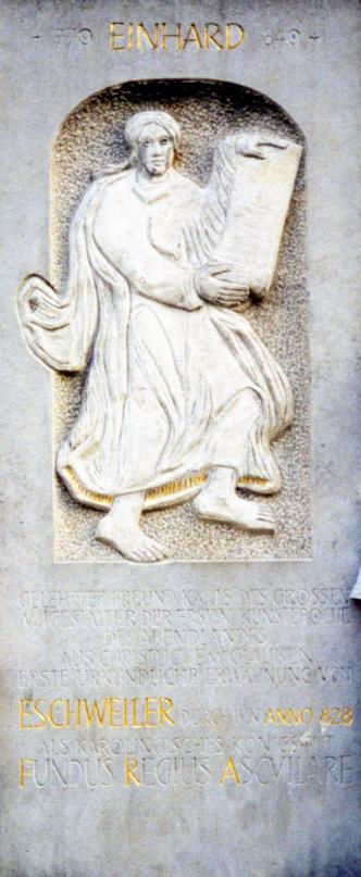 Einhard-Denkmal im Eschweiler.